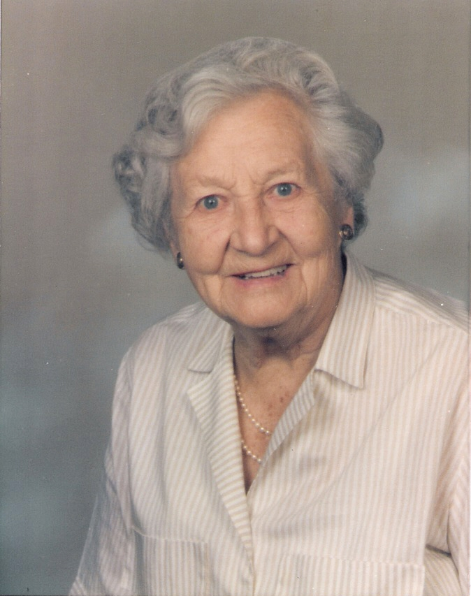 Katharina Bregant